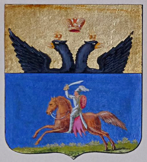 Беларуская (тарашкевіца): Себеж (Siebiež). Герб места з «Пагоняй» («Pahonia»)